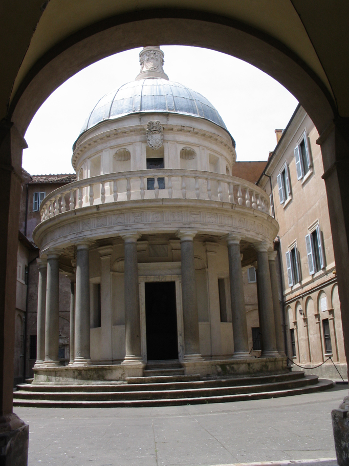 Roma, Italia